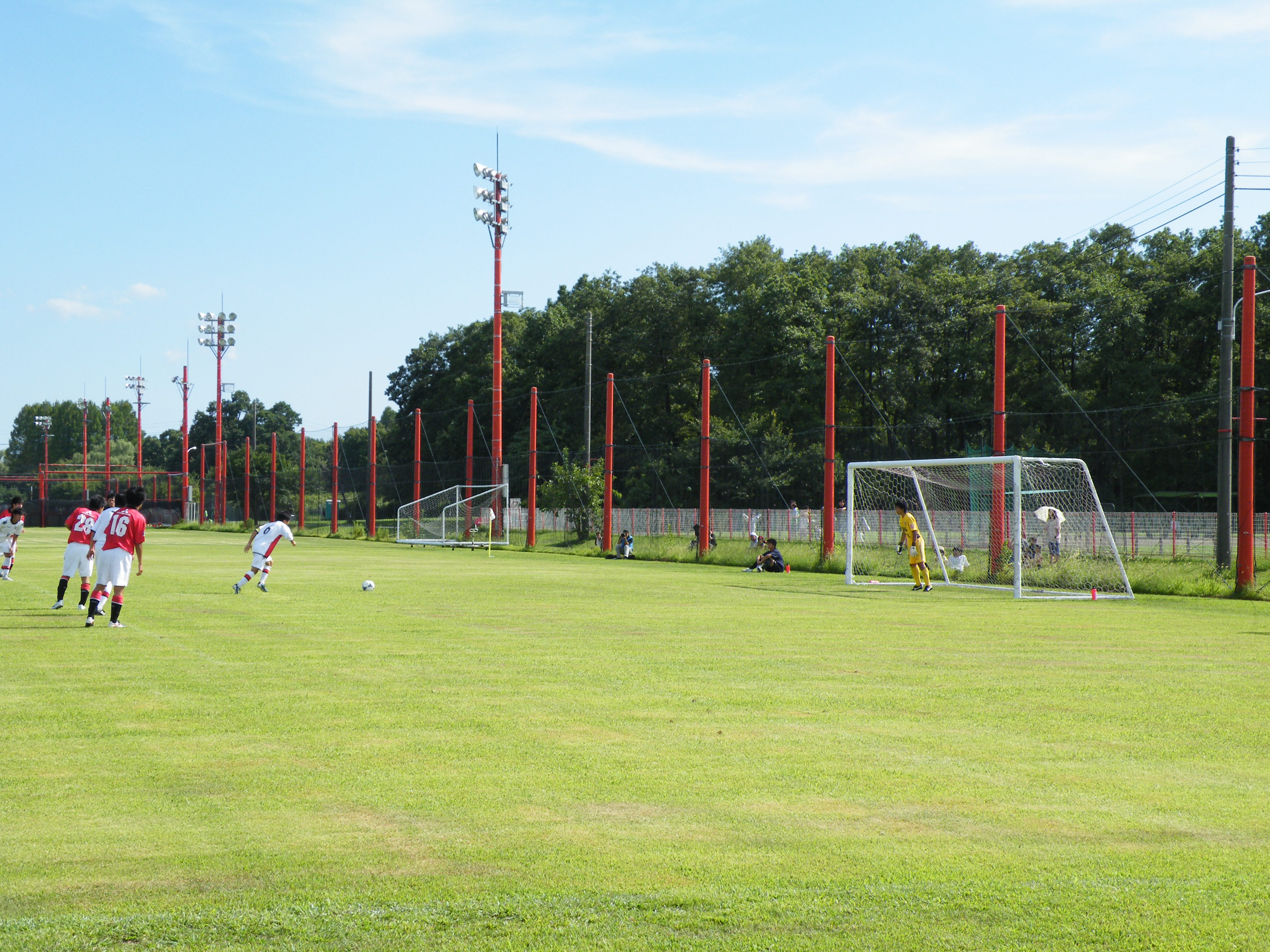 レッズランド天然芝ピッチ。 浦和レッズユース対コンサドーレ札幌U-18の試合（2012年高円宮杯U-18プレミアリーグ）。